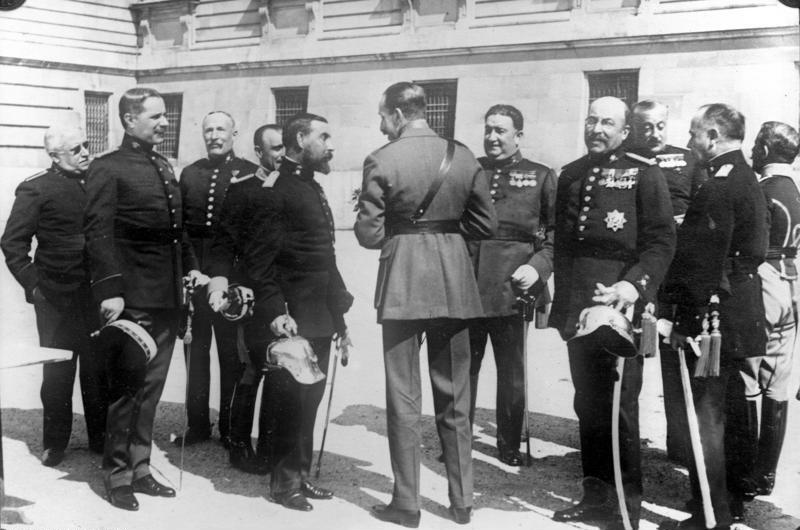 Zur Abdankung des Königs von Spanien! König Alfons von Spanien im Gespräch mit Generälen auf der Terrasse seines Schlosses in Madrid kurz vor seiner Abdankung.